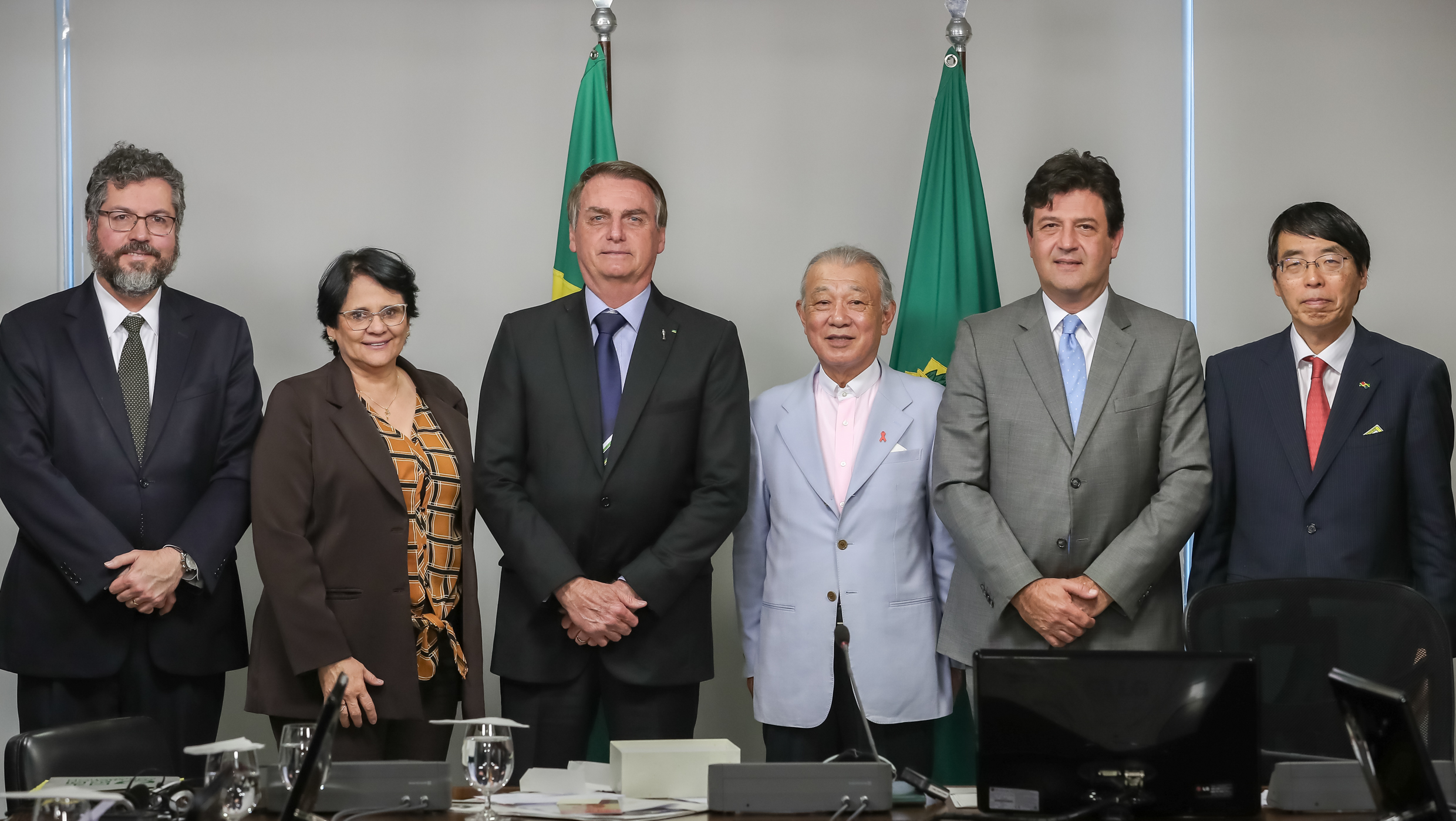 (Brasília - DF, 08/07/2019) Presidente da República, Jair Bolsonaro durante encontro com Ernesto Araújo, Ministro de Estado das Relações Exteriores; e Yohei Sasakawa, Presidente da Fundação Nippon.